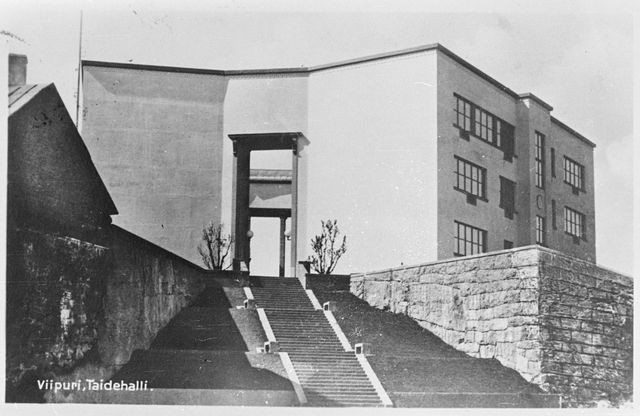 Viipurin taidemuseo